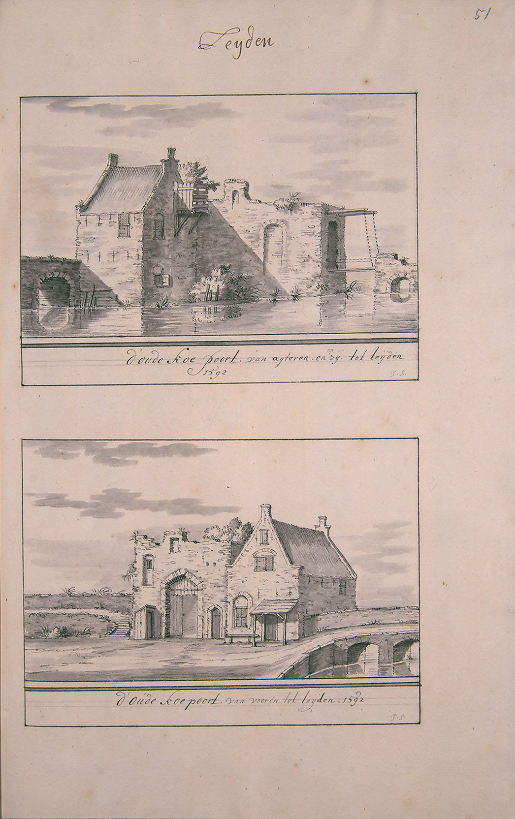 Beschrijving en Afbeelding der Steeden Dorpen Gehugten Aadelijke En Andere Gebouwen In Zuijt Holland en Aankleving van Dien Meest naat leeven getekeent. en Naat A.B.C. gelegt Dus Beschreeven en bij een Versaamelt Door Andries Schoemaker 1730